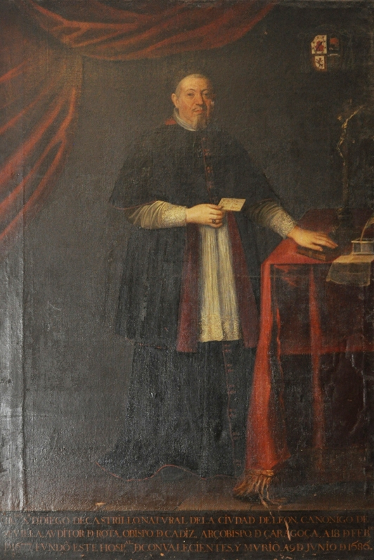 Retrato del prelado español Diego de Castrillo († 1686), que llegó a ser obispo de Cádiz y arzobispo de Zaragoza.